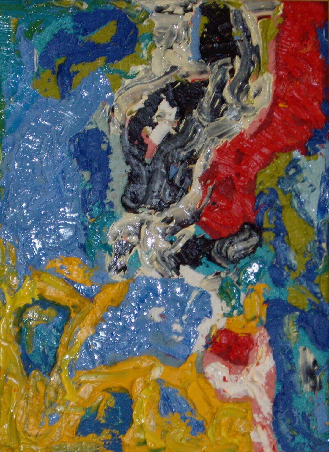 huile sur toile cm 40 x 30